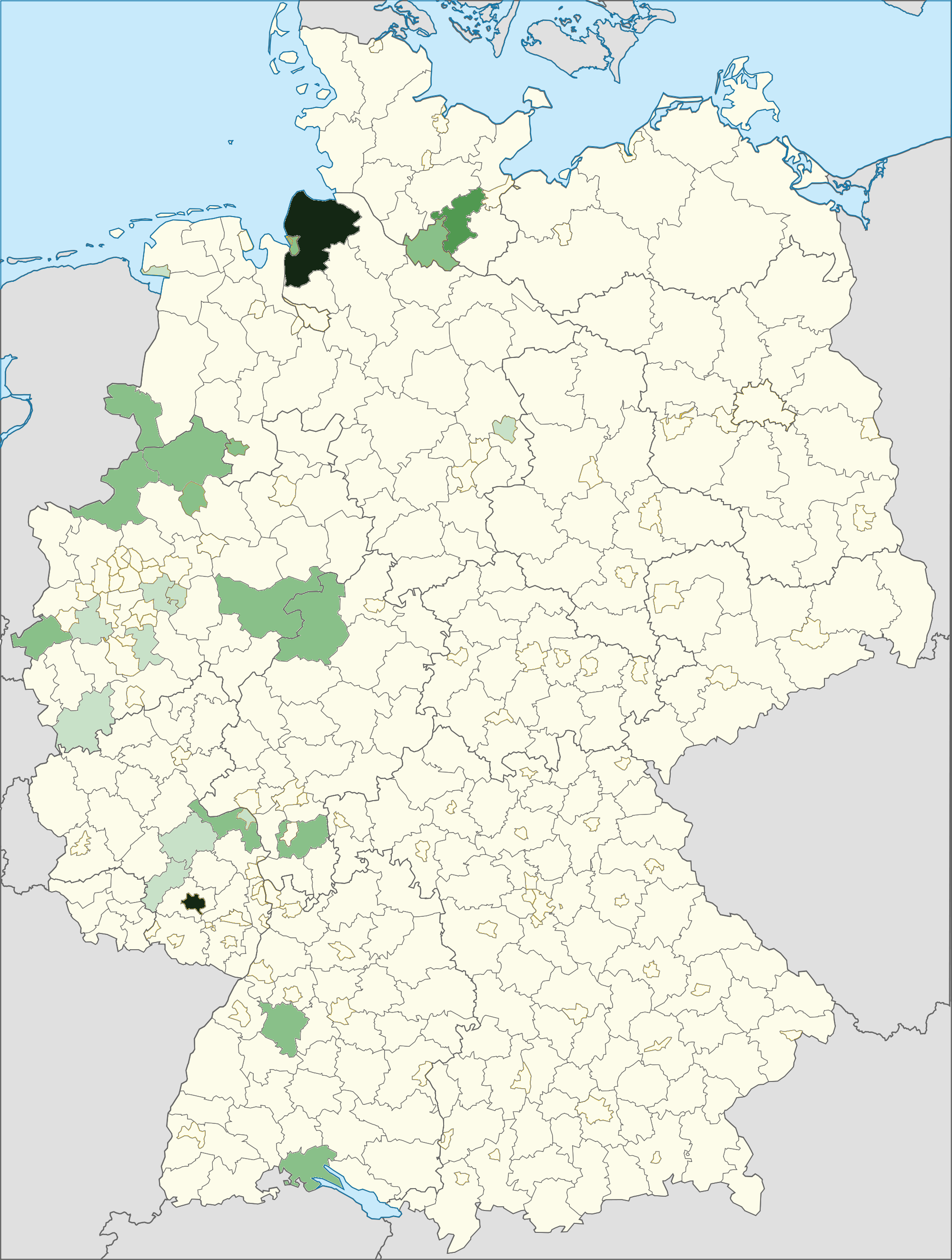 Karte der Personen mit portugiesischer Staatsangehörigkeit und deren relativer Häufigkeit in den Landkreisen 2014. Dunkelgrün: häufigste ausländische Staatsangehörigkeit in diesem Kreis, hellgrün: fünfthäufigste ausländische Staatsangehörigkeit in diesem Kreis, weiß: sechsthäufig oder weniger. Quelle: Ausländerzentralregister, Stand 31. Dezember 2014. Saarland: keine Daten auf Kreisebene (dargestellt ist die Landesebene). Deutschlandweite relative Häufigkeit der ausländischen Staatsangehörigkeit Portugal: Platz 16.